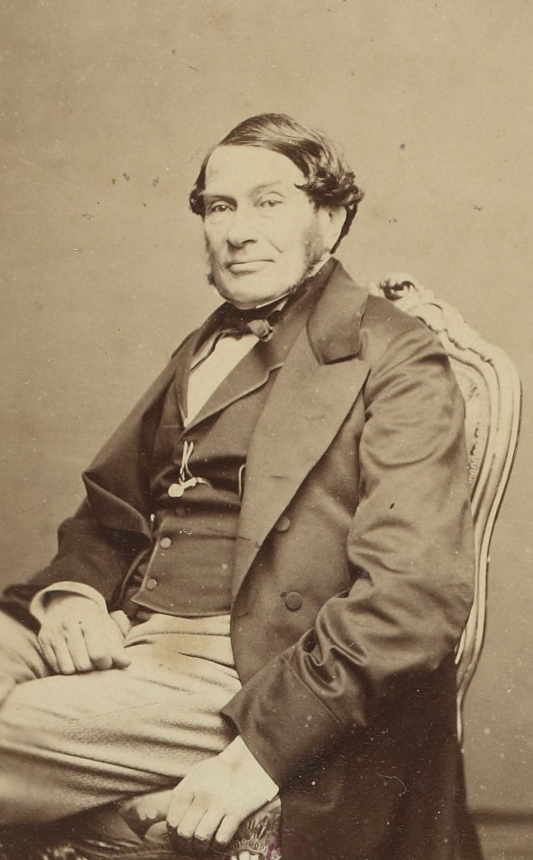 Personnalités françaises et étrangères sous le Second Empire.